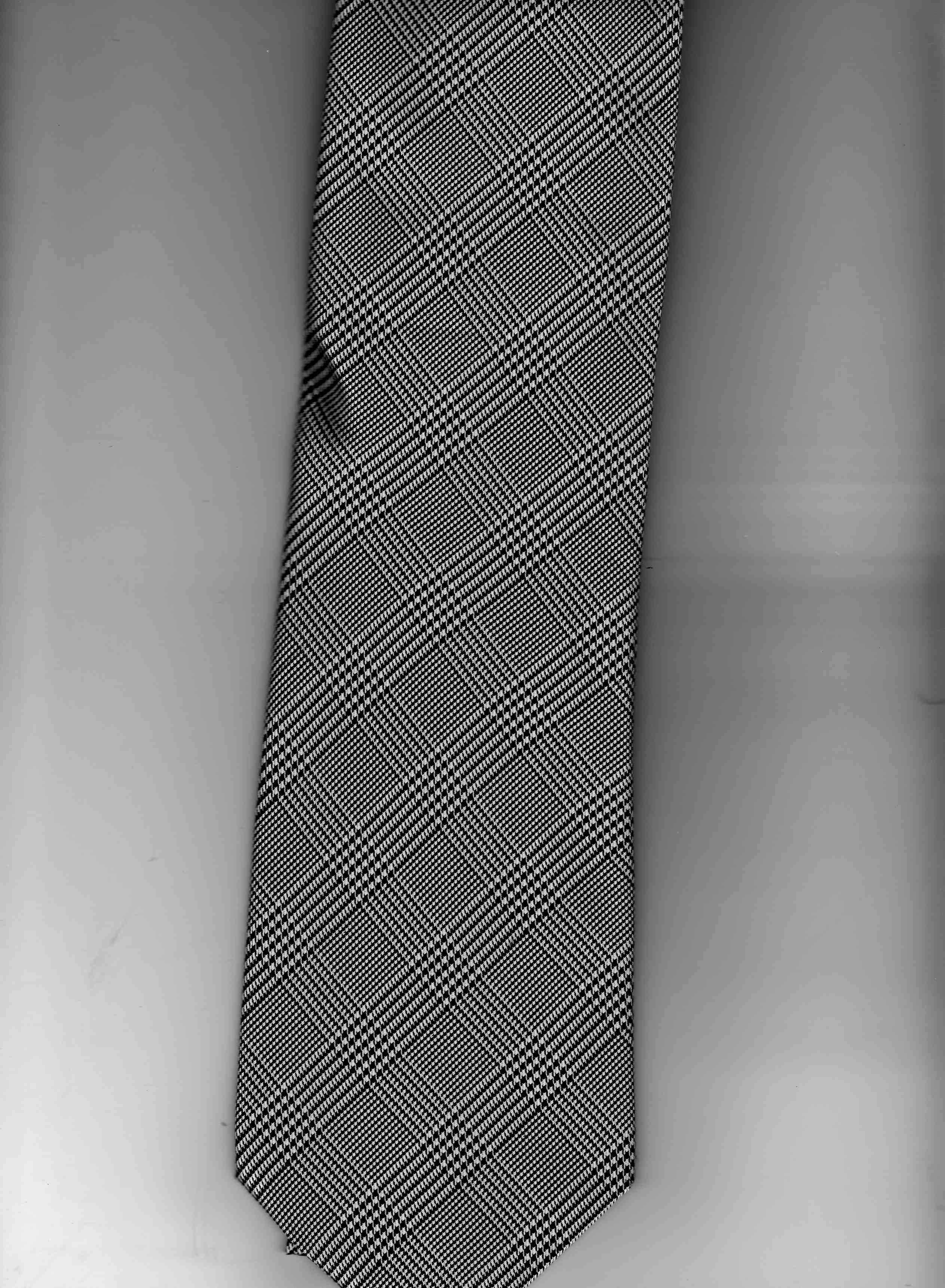 Krawatte mit Glencheckmuster